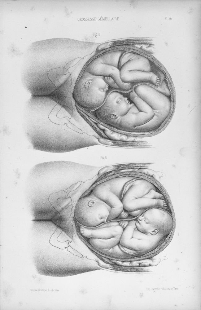 Emile Beau : Grossesse gémellaire Ouvrage : Atlas complémentaire de tous les traités d'accouchements Edition : Paris : Masson, 1865 Auteur : Adolphe Lenoir